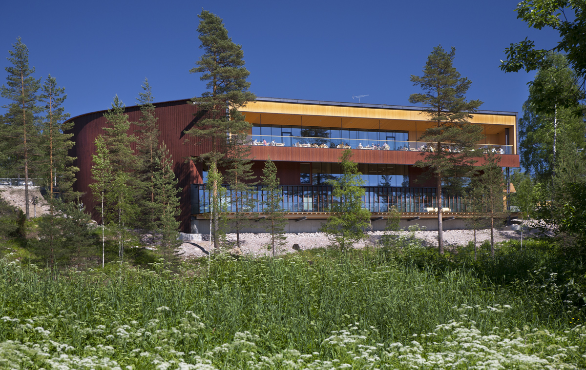 Suomen luontokeskus Haltia, Nuuksio, Espoo. Valmistumisvuosi 2013. Arkkitehtitoimisto Lahdelma & Mahlamäki Oy, arkkitehti Rainer Mahlamäki.